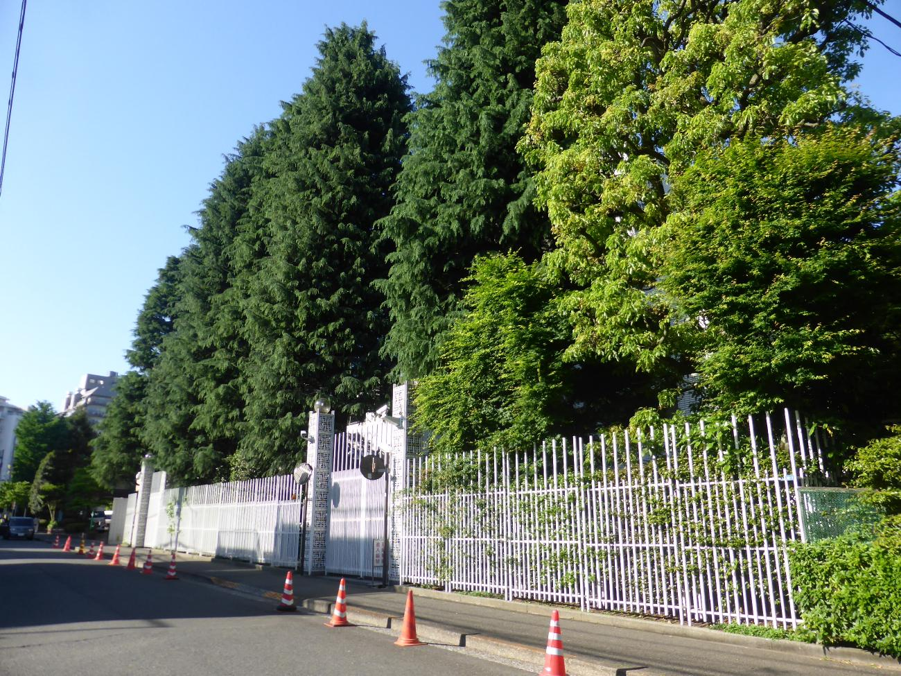 駐日台湾大使館通用口側